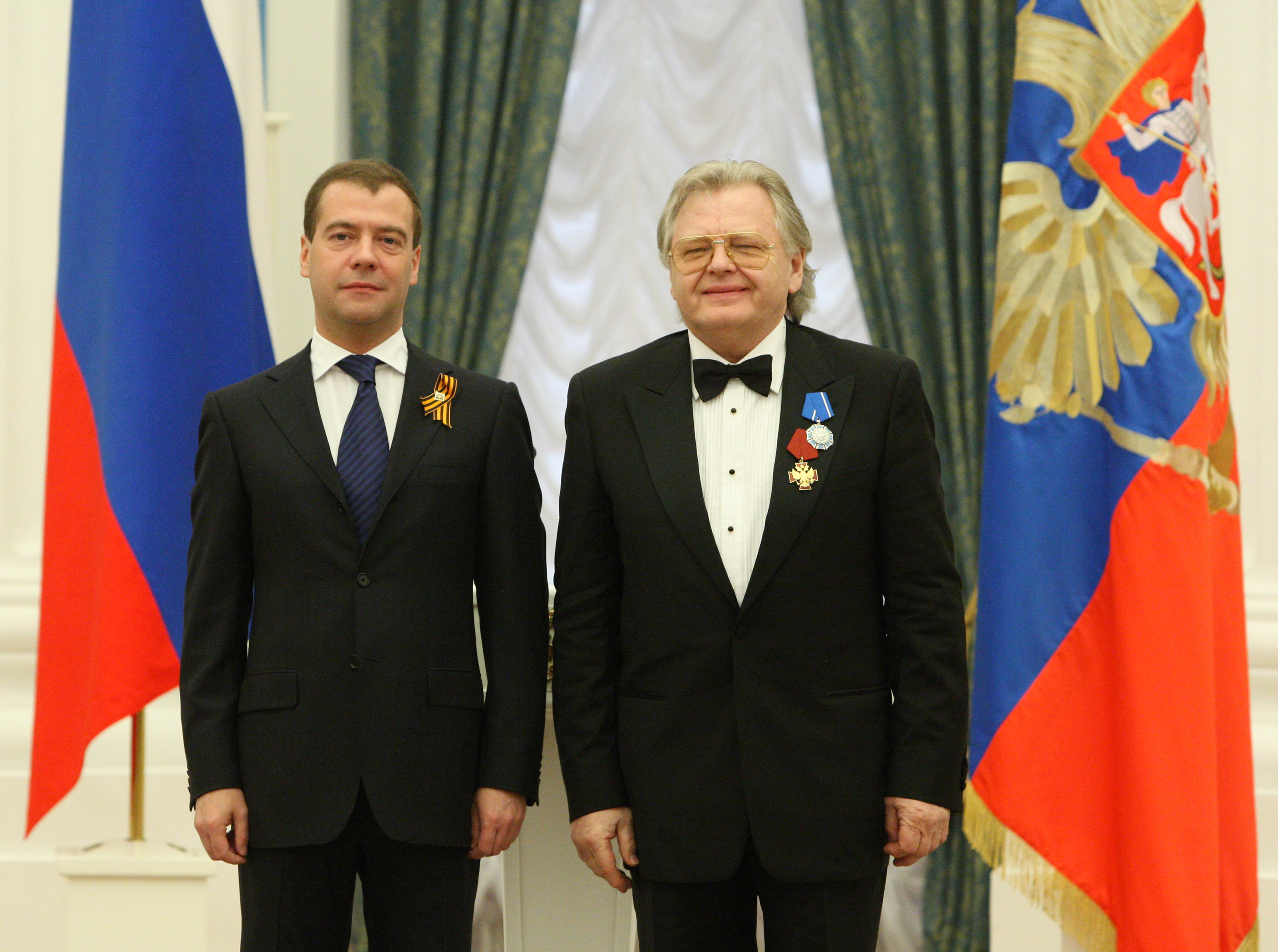 Юрий Антонов